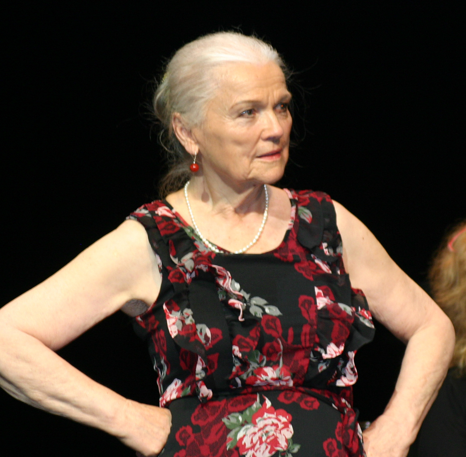 Eva-Maria Hagen während eines Auftritts im Berliner Ensemble.